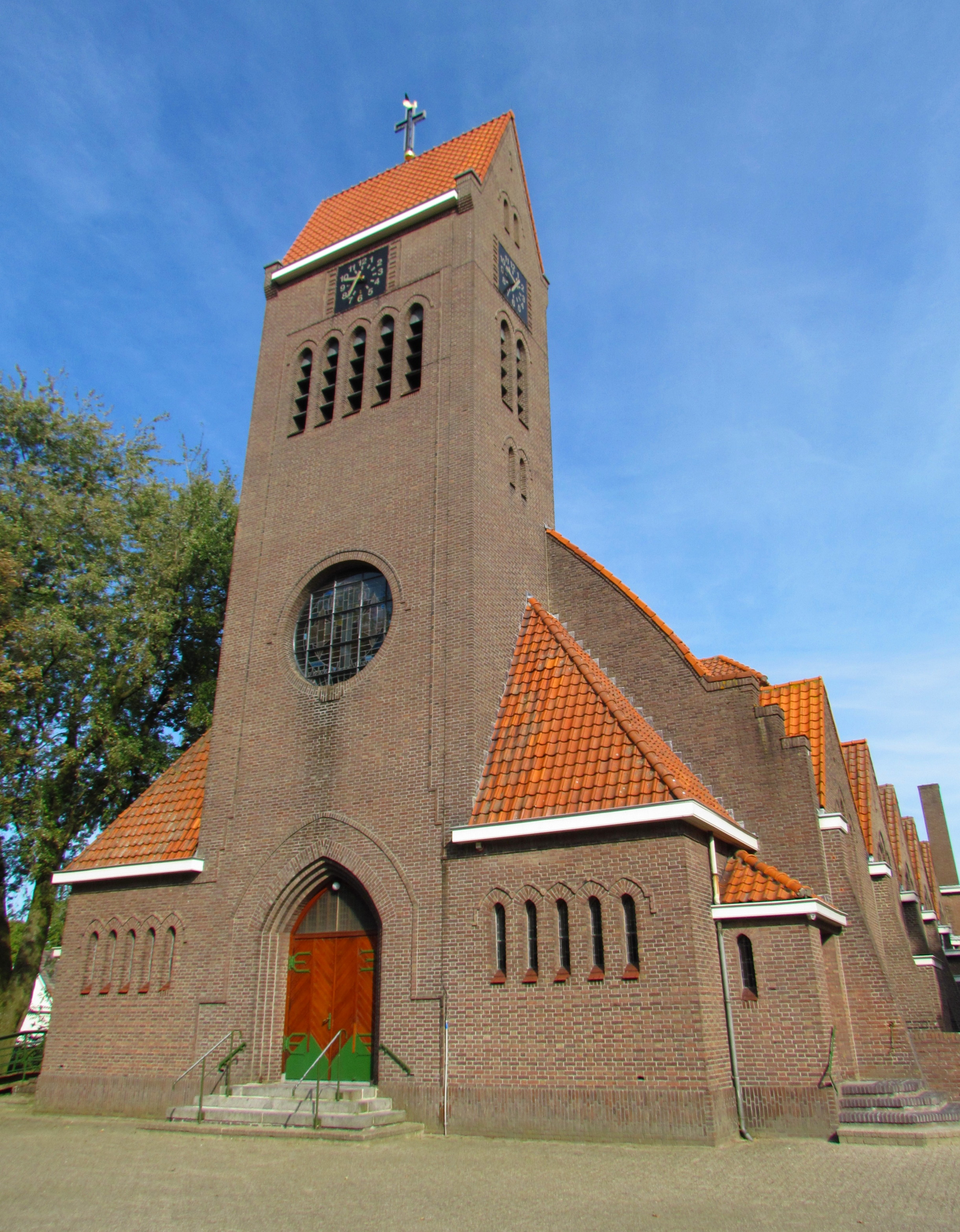 Heilige Jozef (1923), Barger-Compascuum, Drenthe, NL